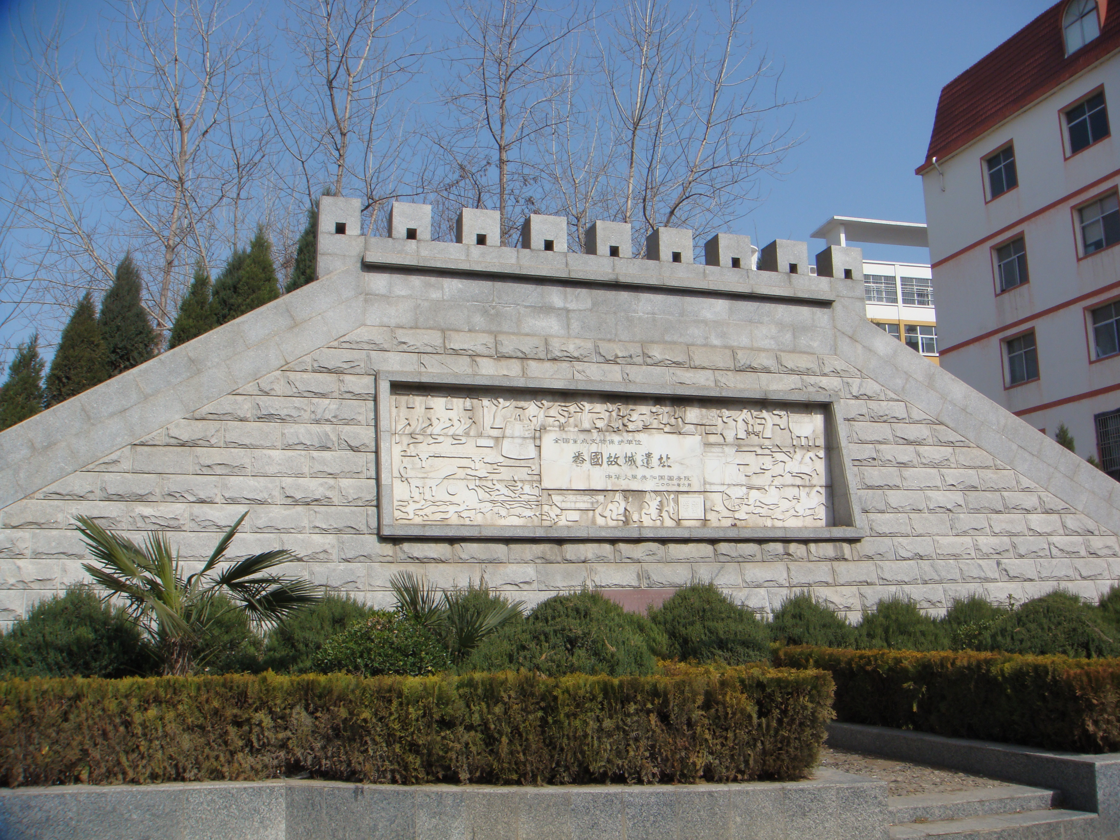 中文（中国大陆）: 番国故城遗址南端景观，摄于固始县蓼北路